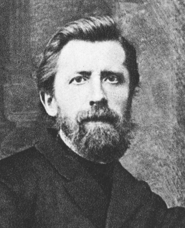 Franz Boden